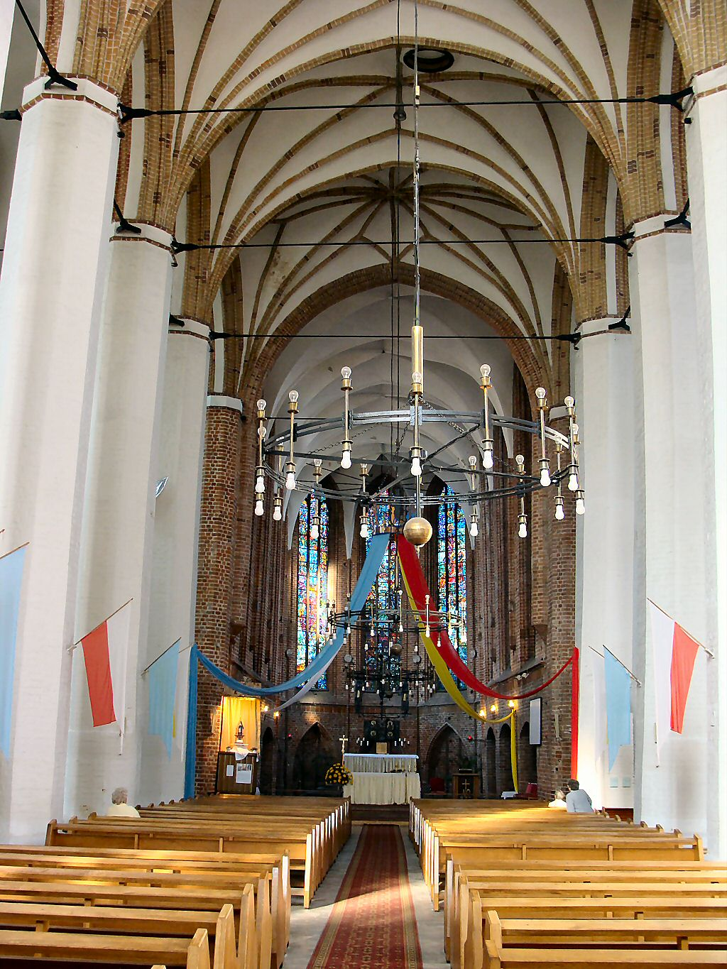 Kościół św. Jana Ewangelisty w Szczecinie - wnętrze